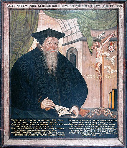 Julius von Pflug (1499-1564)